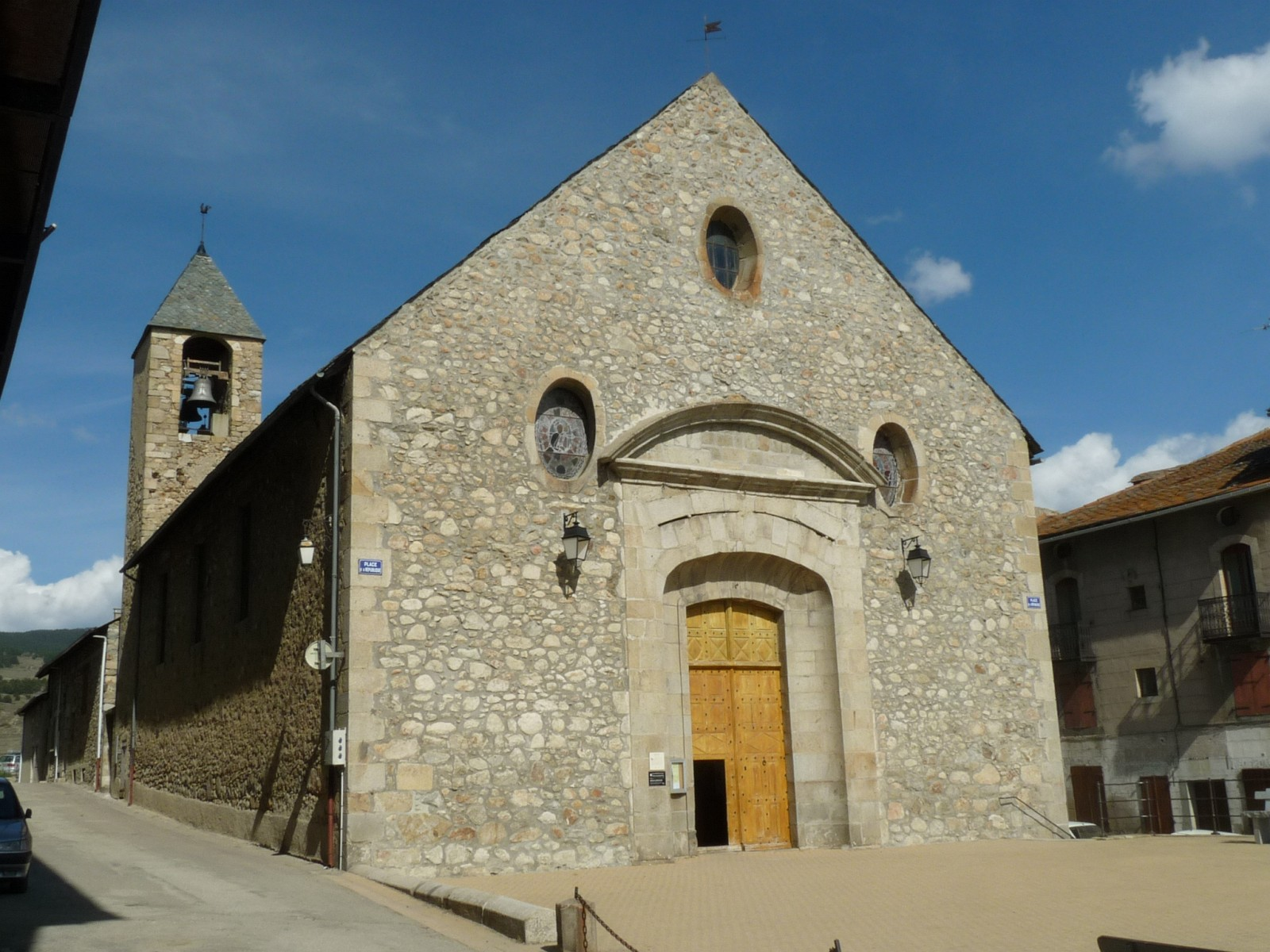 Eglise de Mont-Louis, Pyrénées-Orientales, France